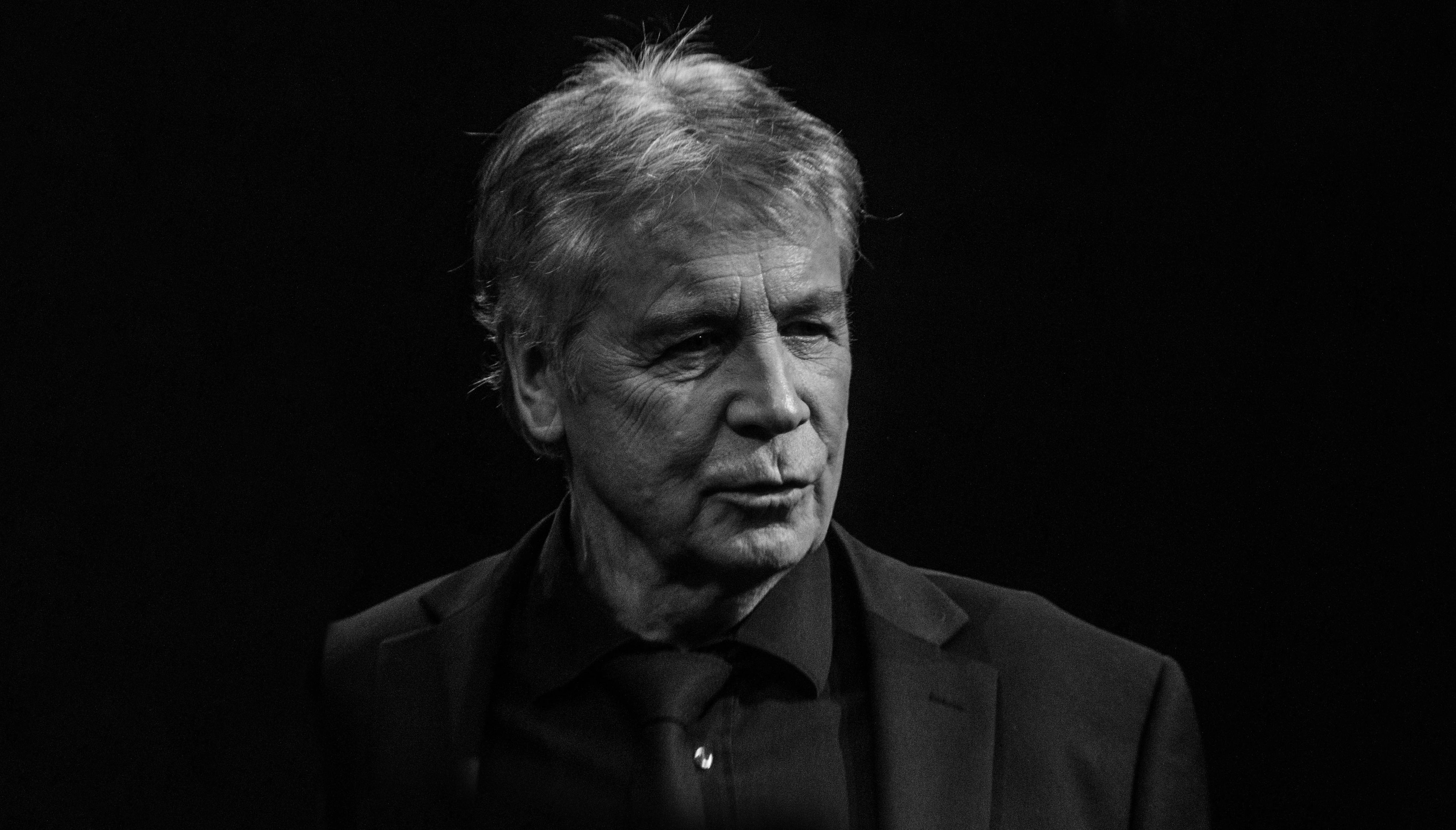 Knut Lystad etter opptaket av programmet «KLM 40 År»